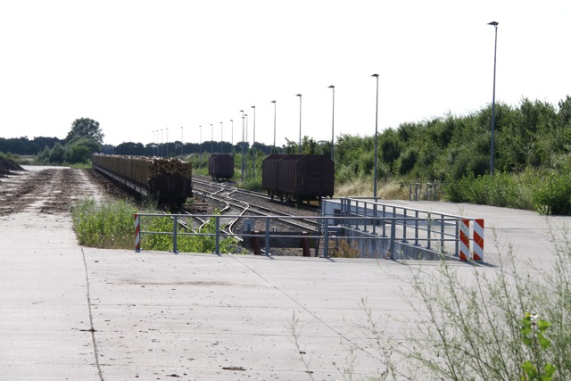 Bahnhof Billberge, zur Ortschaft Storkau (Elbe) gehörend, Stadt Tangermünde